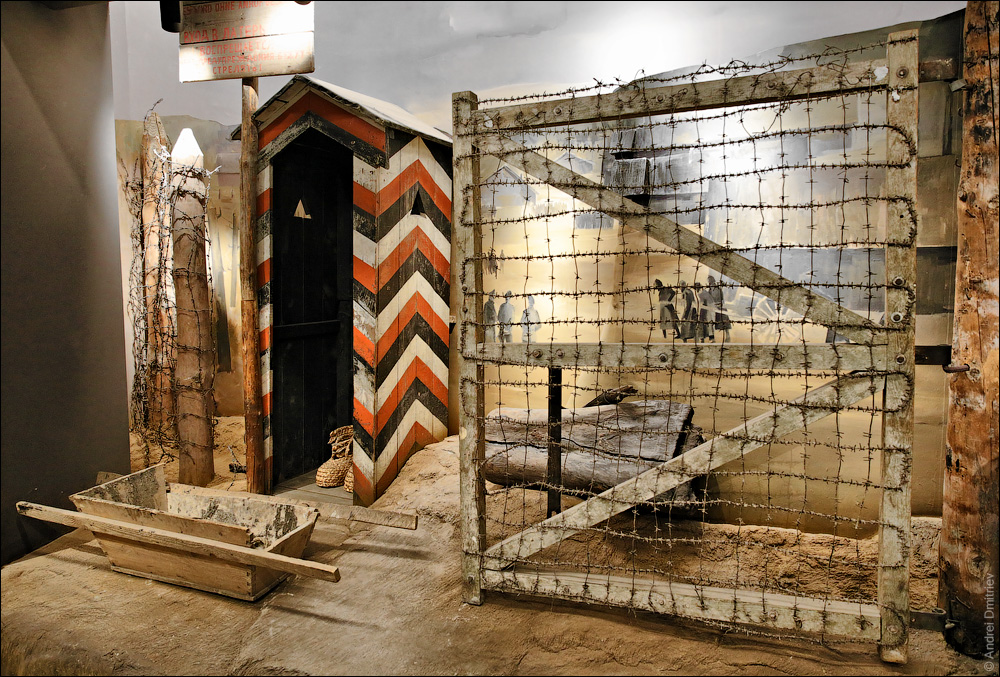 Экпазіцыя музея ВАв